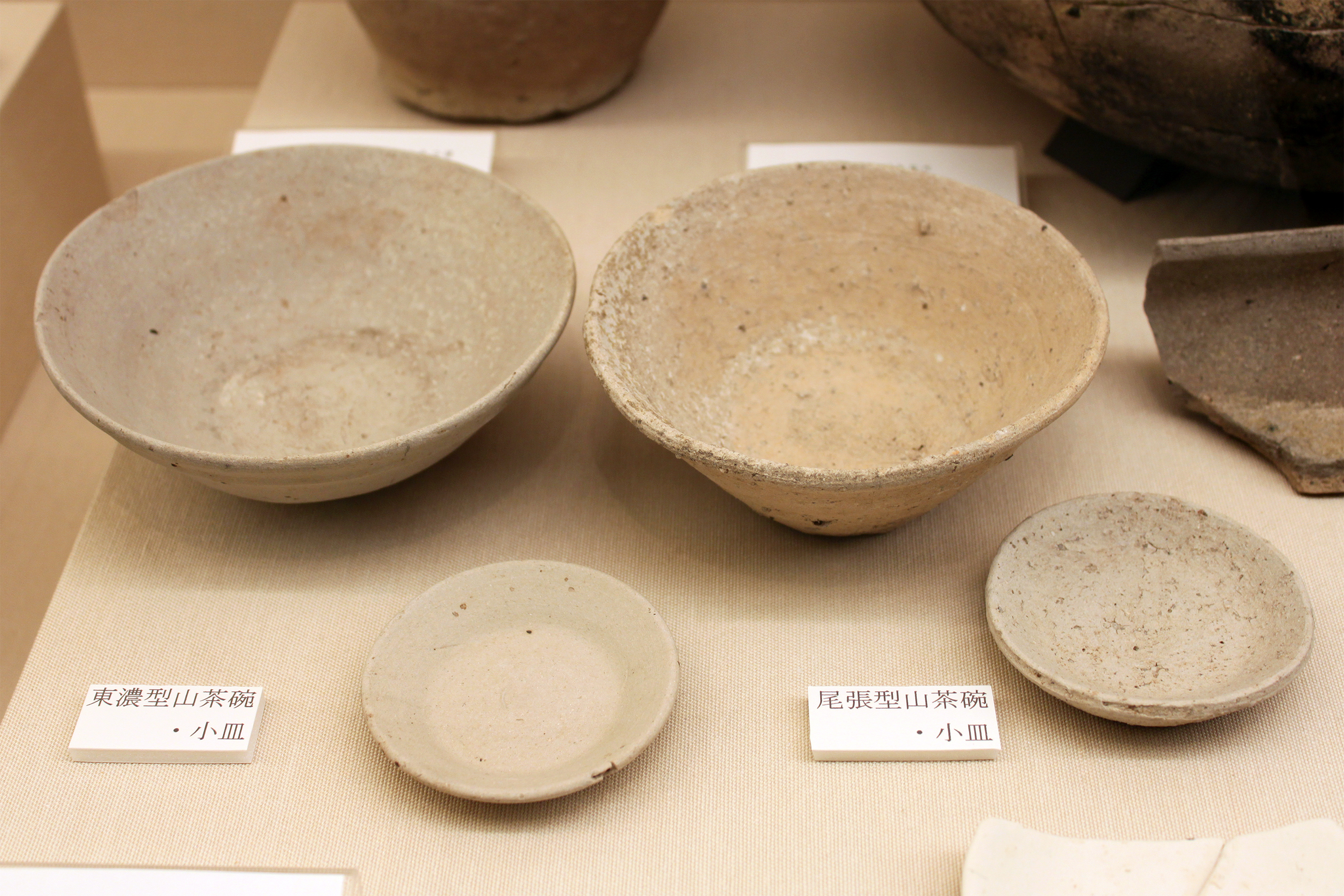 東海地方の山茶碗